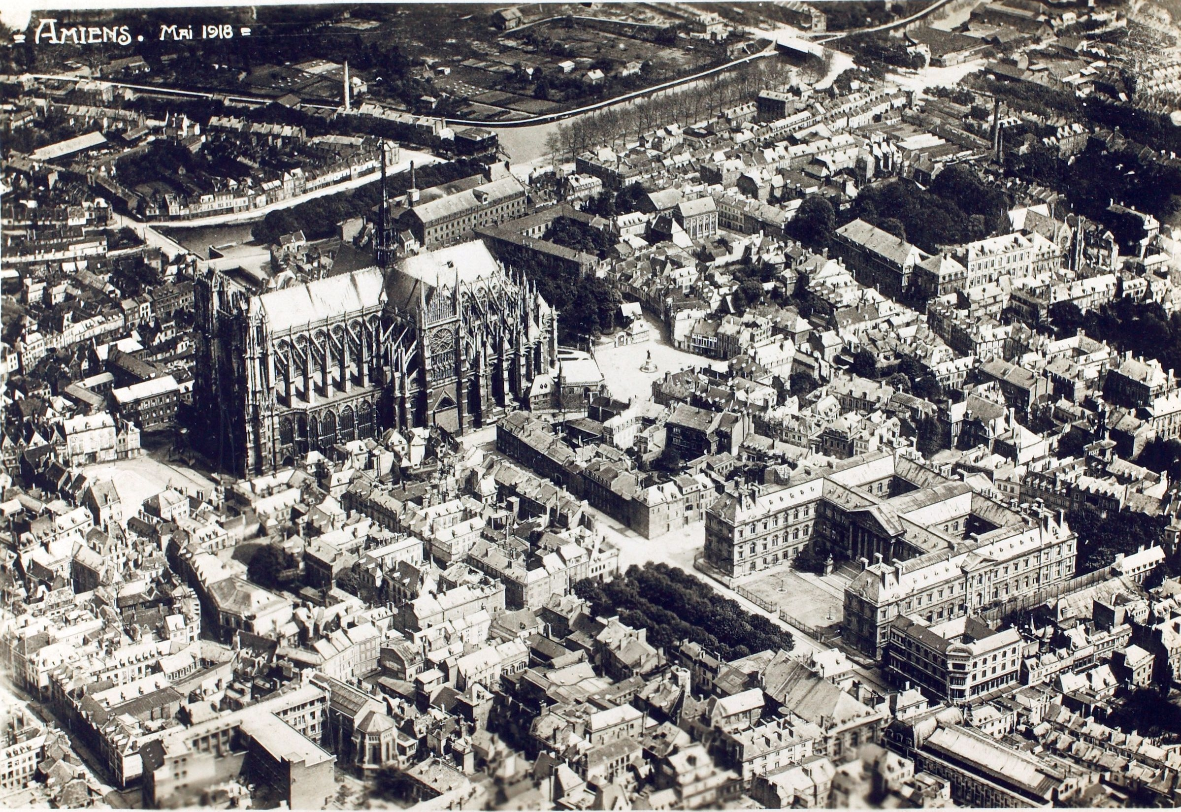 Vue générale d'Amiens en mai 1918 durant l'opération Michael. Par John McGrew, membre de la "Photographic Section of the 5th Aero Group A.E.C"